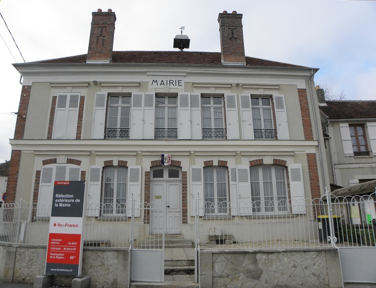 Mairie de Mons-en-Montois (77).